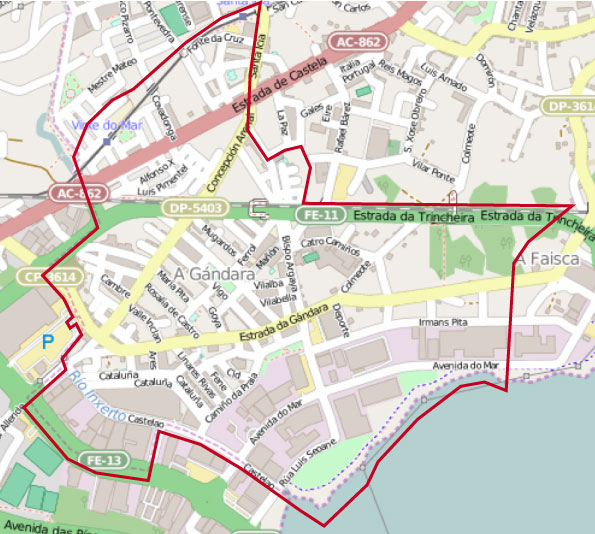 Mapa OSM, outubro de 2015, da Gándara.